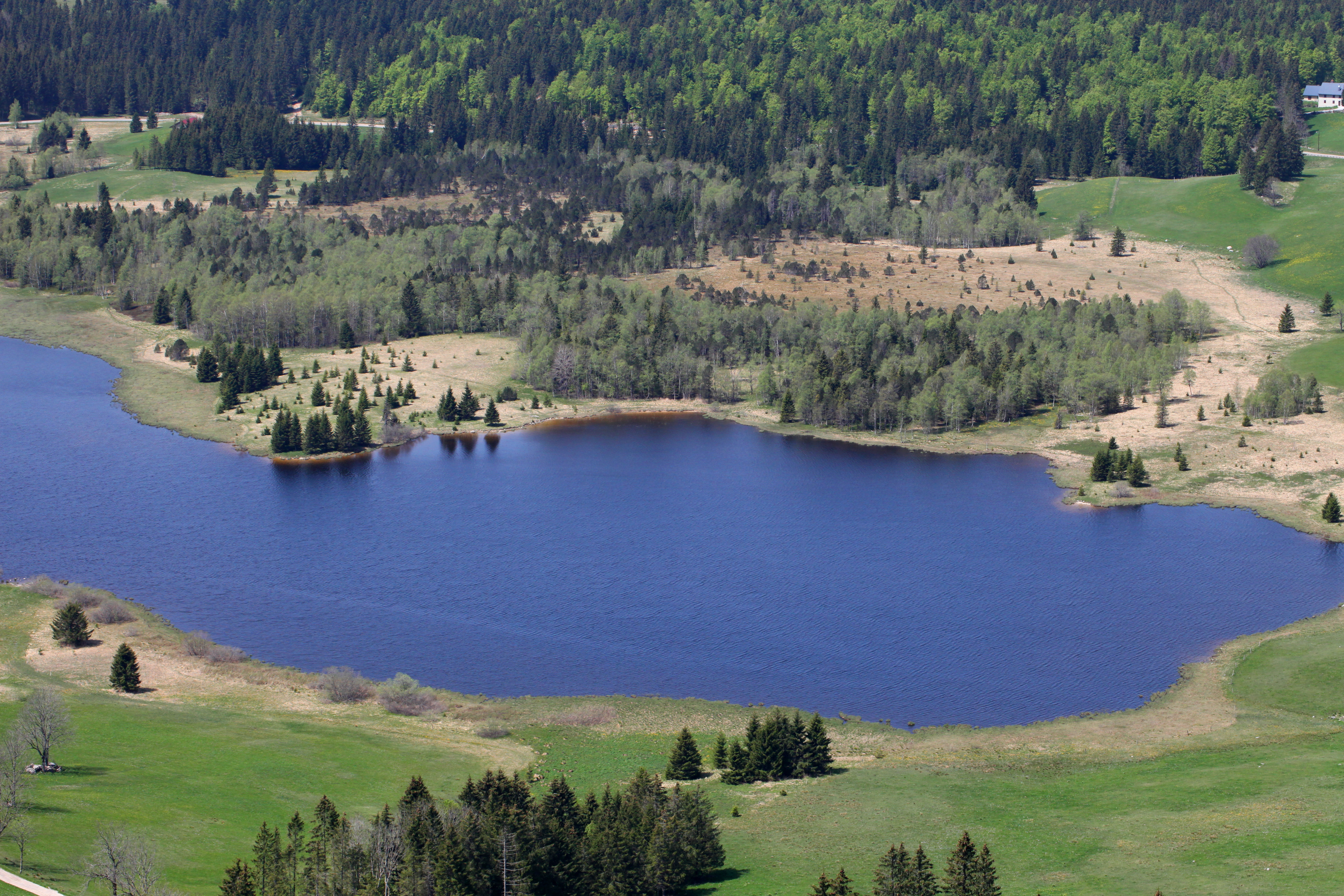 Le lac de Bellefontaine et ses tourbières vu du belvédère de la Roche Bernard.